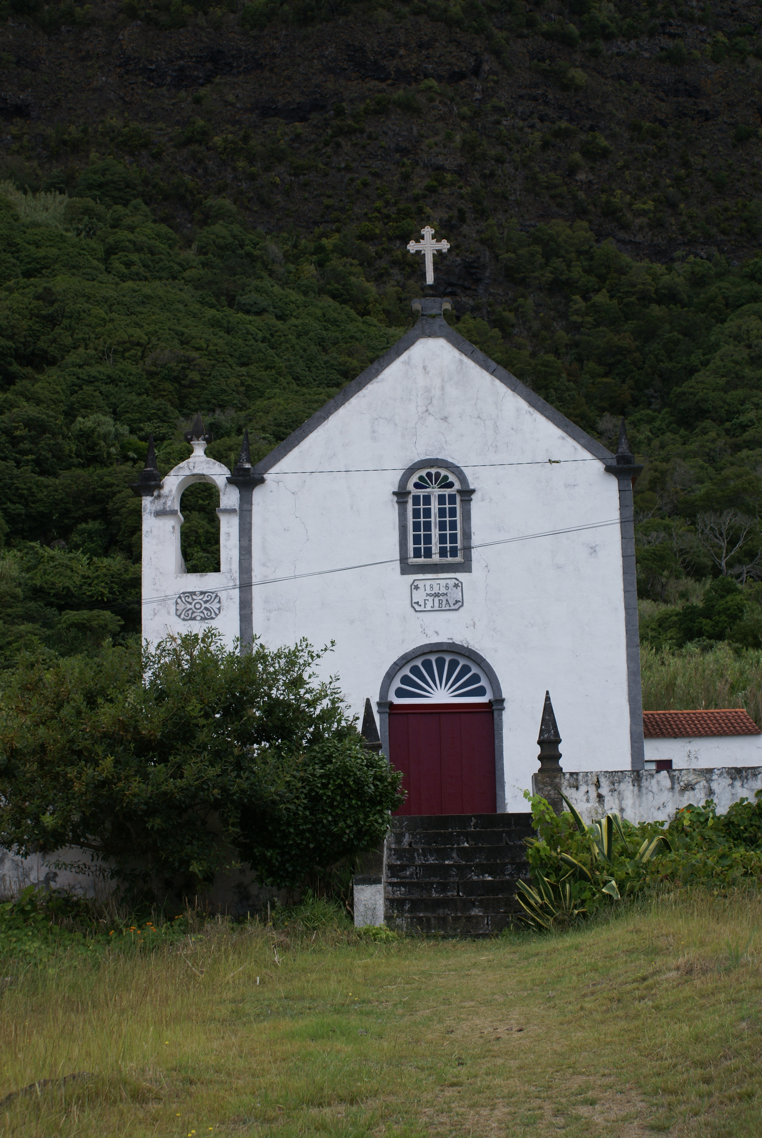 Fajã das Almas, Igreja de Santo Cristo, Manadas, Velas, Ilha de São Jorge, Açores